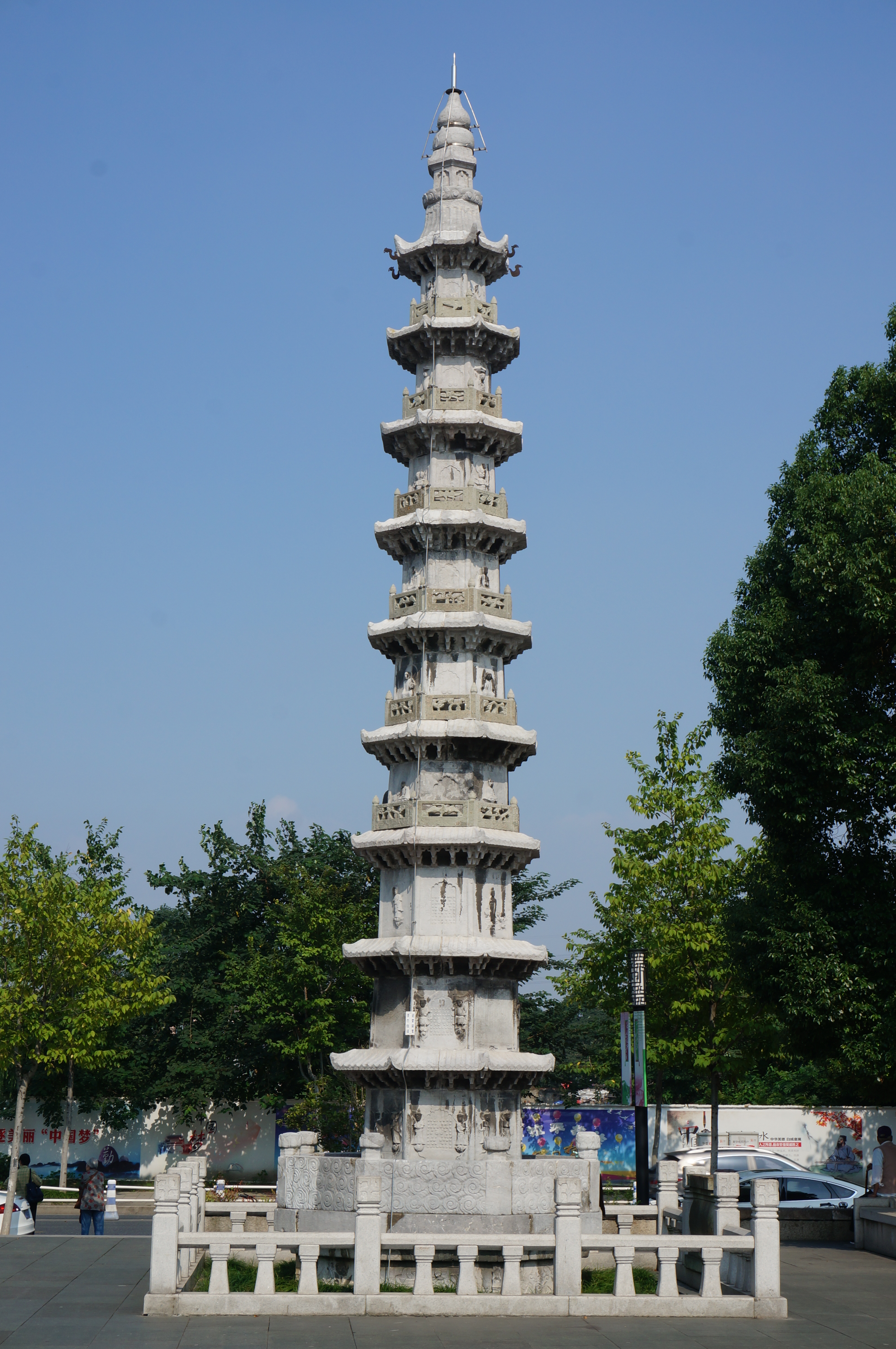 杭州香积寺西塔，自西侧看。